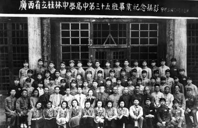 桂林中学高中第35班毕业合影，后排圈中者为黄旭华，前排圈中者是以体谋。